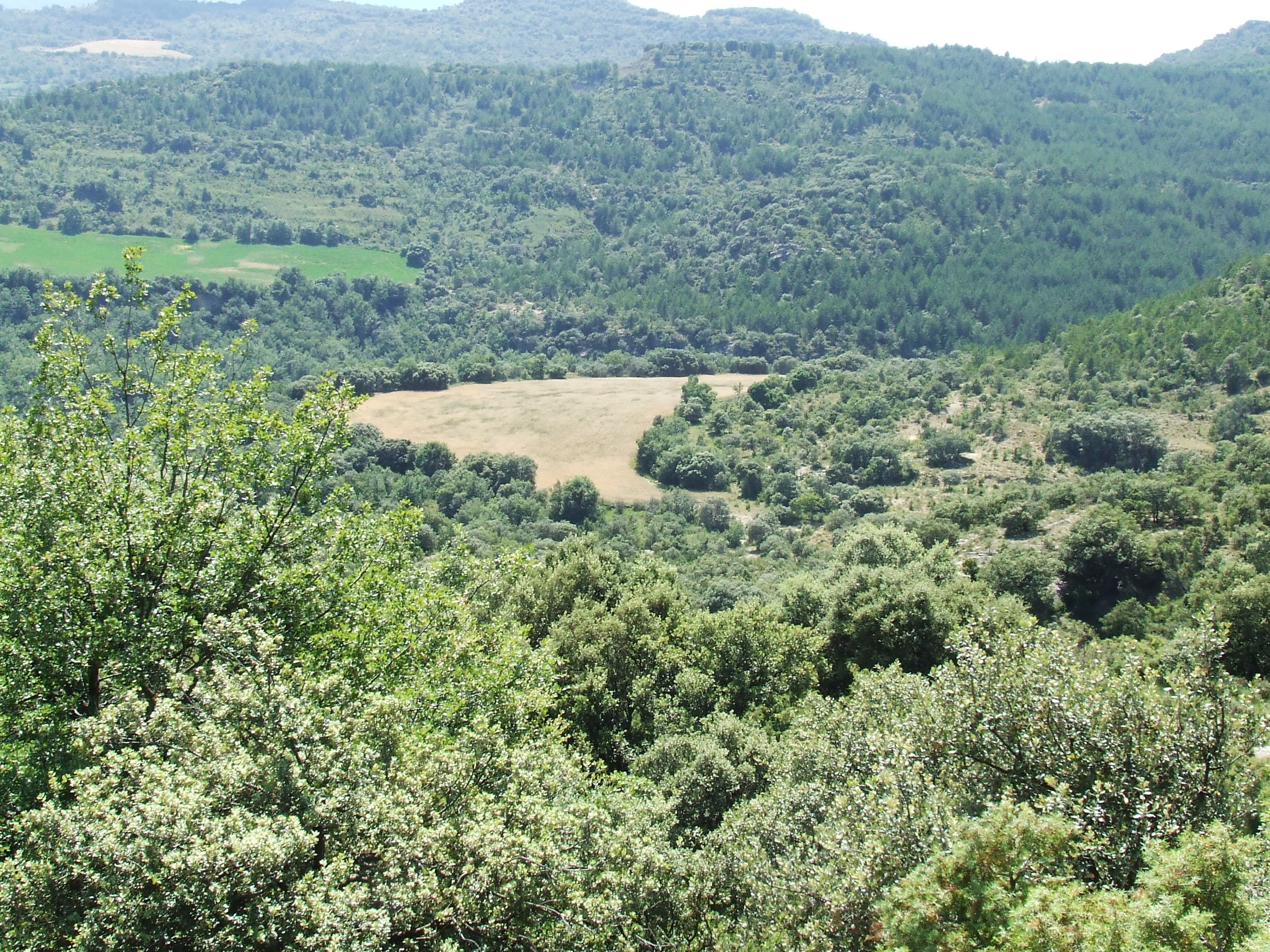 Carboner (Miravet, Mur, Castell de Mur, Pallars Jussà)